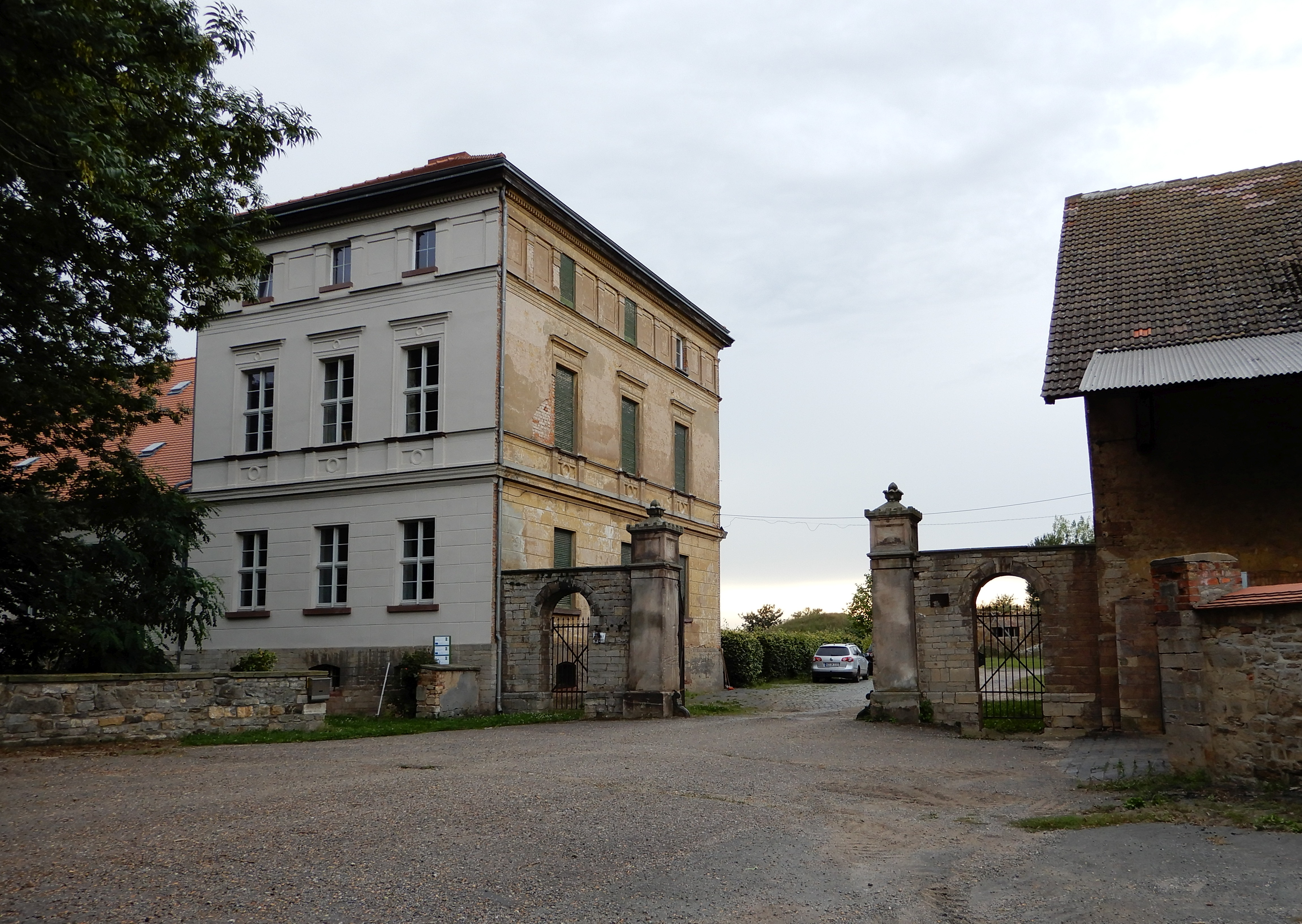 Herrenhaus von 1857 auf Gut Endorf mit Einfahrt